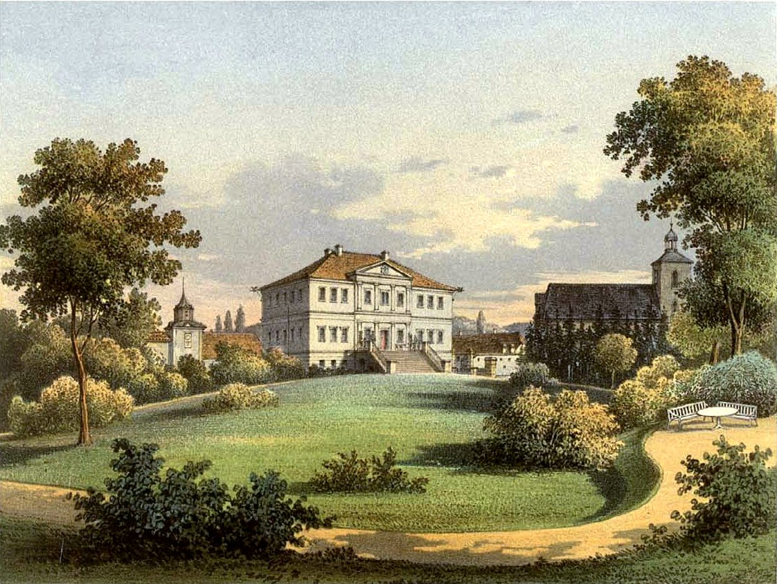 Gut Wohlmirstedt